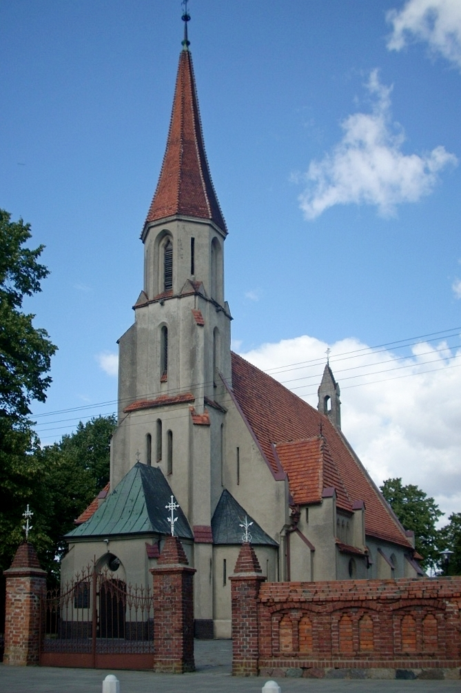 Kościół p.w. św. Wawrzyńca w Wonieściu (zabytek nr rejestr. 1617)